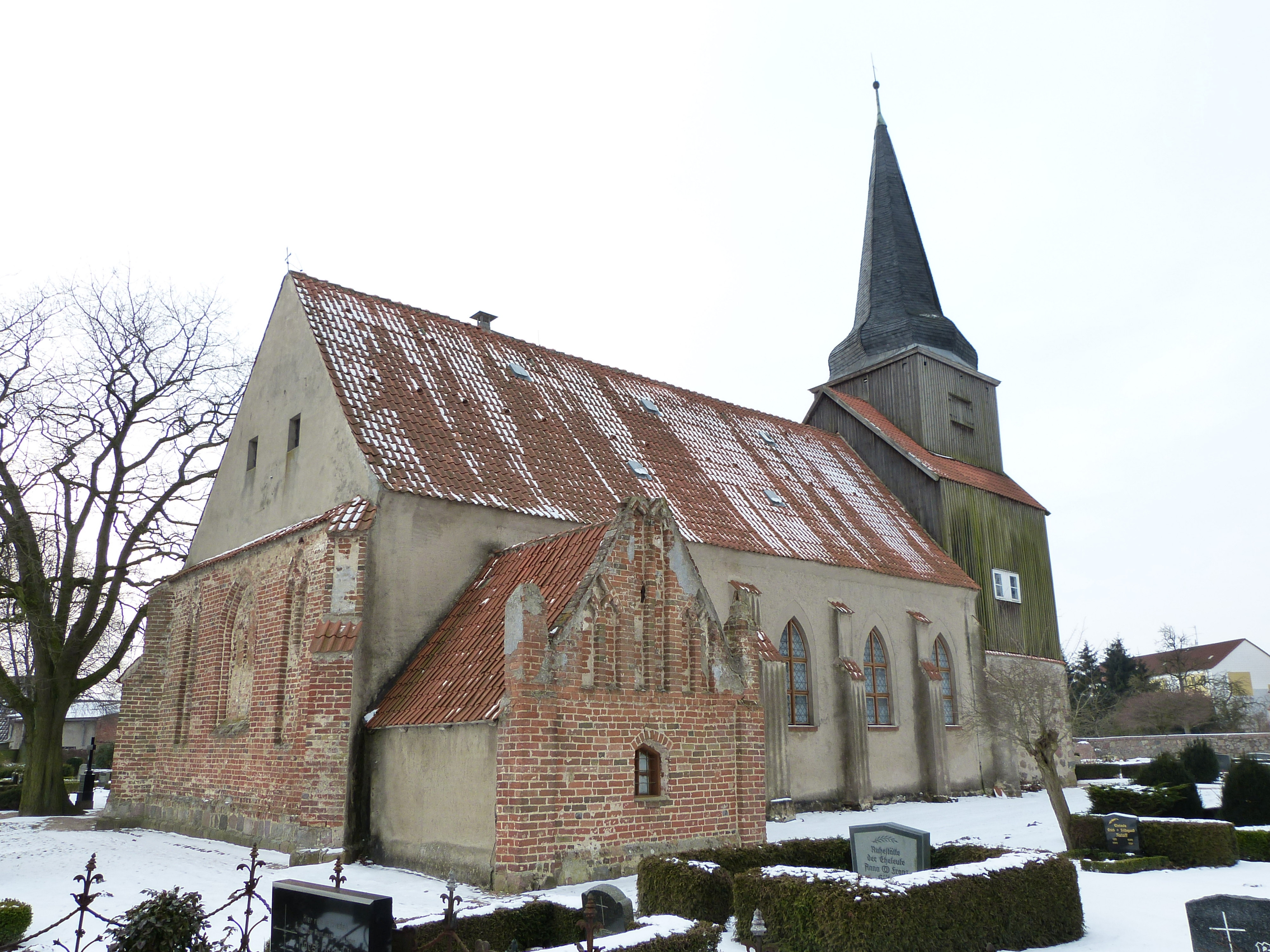 Kirche Krien, Nordseite mit Kapelle